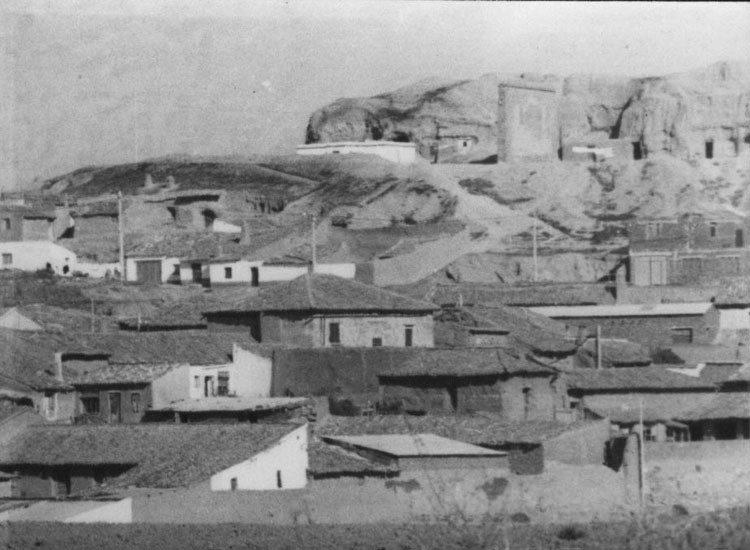 Vista general - Aguilar de Campos (Valladolid) - Fotografía 118 x 86 B/N